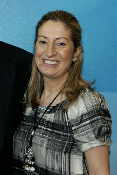 Ana Pastor en la Conferencia Política del Partido Popular celebrada el 19 de noviembre de 2007 en Madrid.